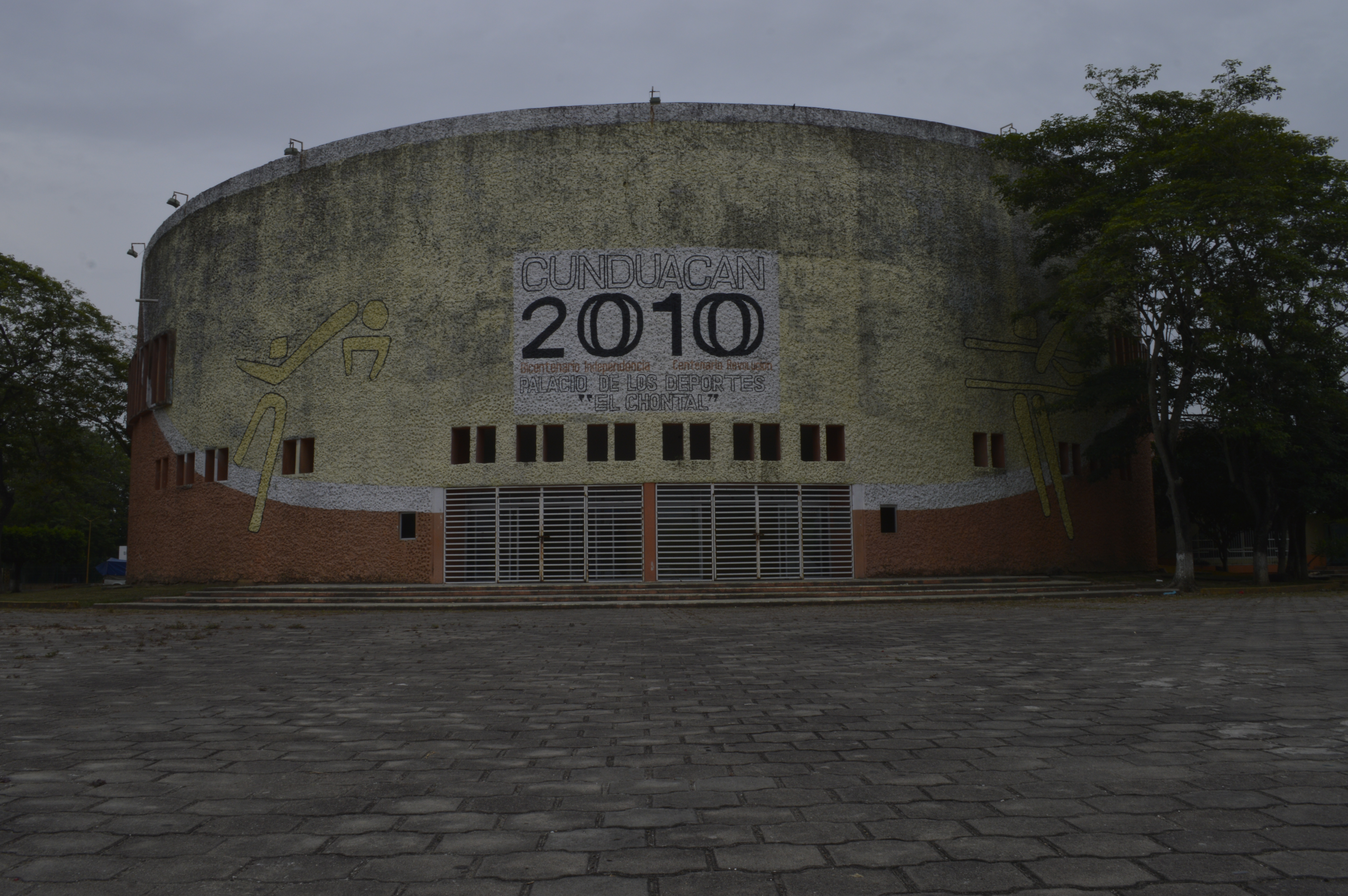 Palacio de los deportes localizado en la unidad deportiva de Cunduacán.